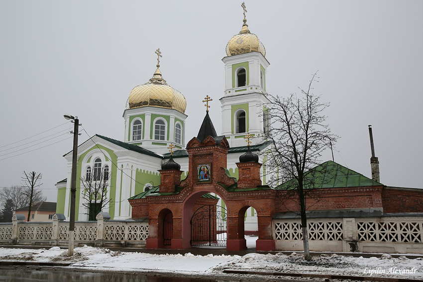 Мсціслаў. Царква Св. Аляксандра Неўскага This is a photo of Belarusian heritage monument. Reference number: 512Г000507 ( WLM)